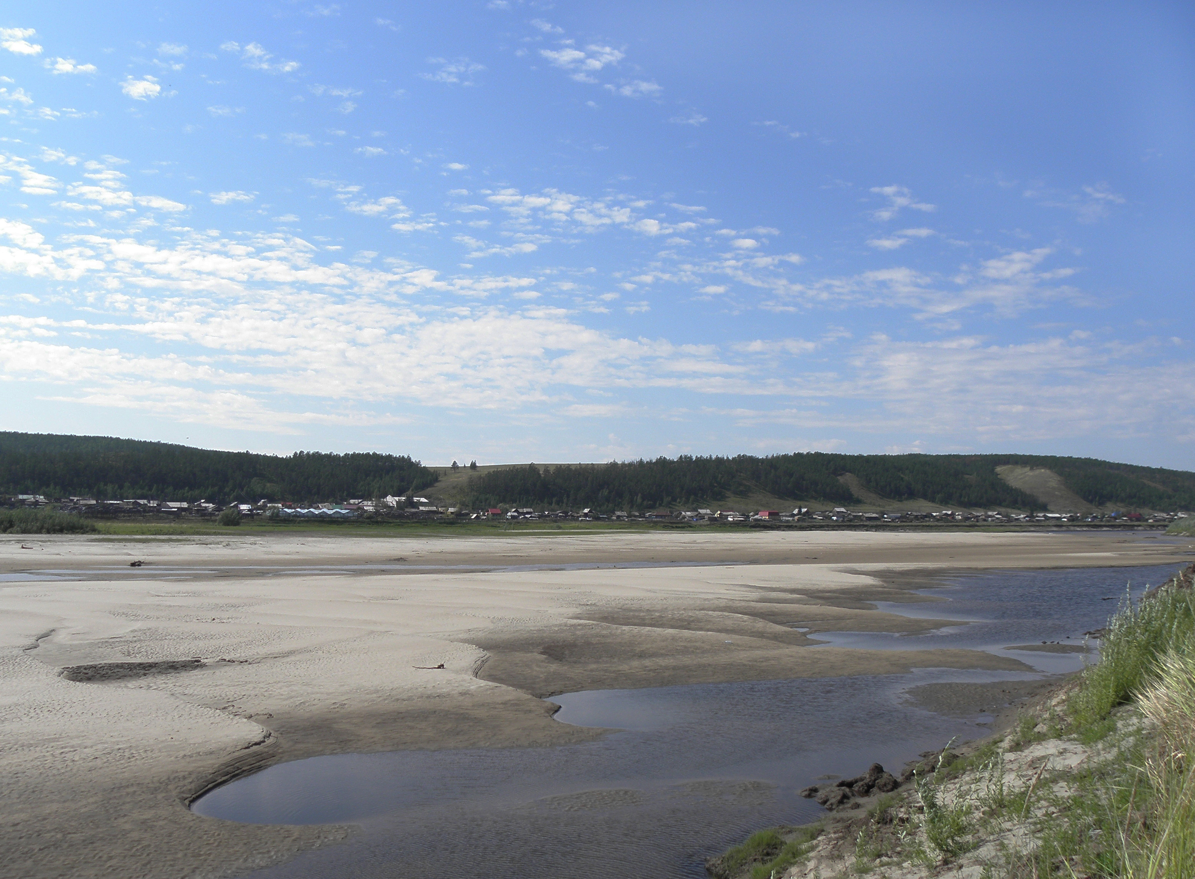 Фотография села Старая Табага (городской округ Якутск) со стороны протоки